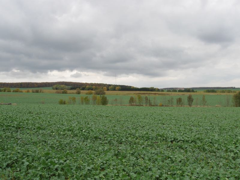 Krajina Drahanské vrchoviny u Ruprechtova a Podomí, v pozadí televizní vysílač Kojál